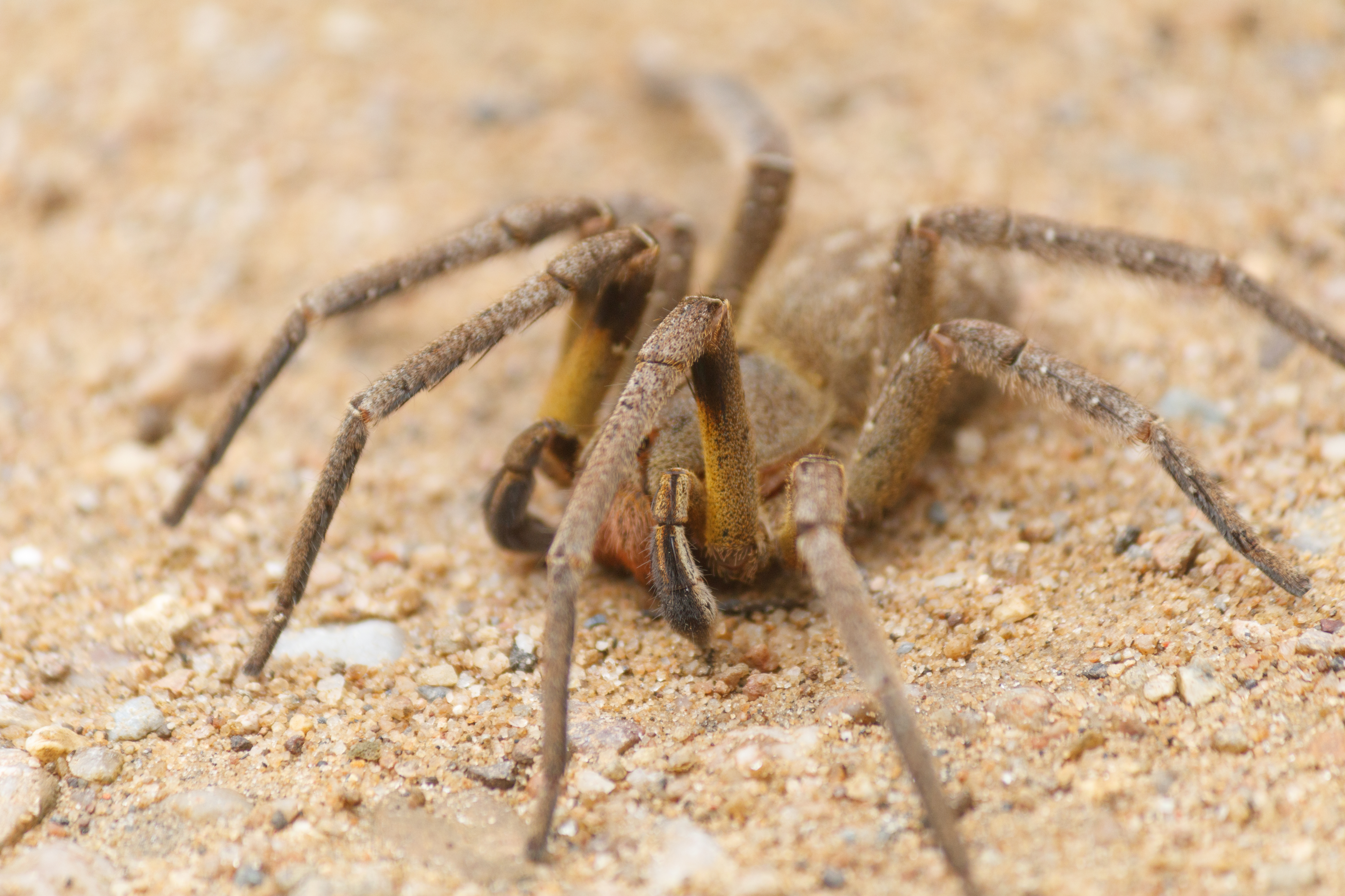 Núcleo Santana por Rodrigo Tetsuo Argenton feitas na expedição PETAR fevereiro 2020